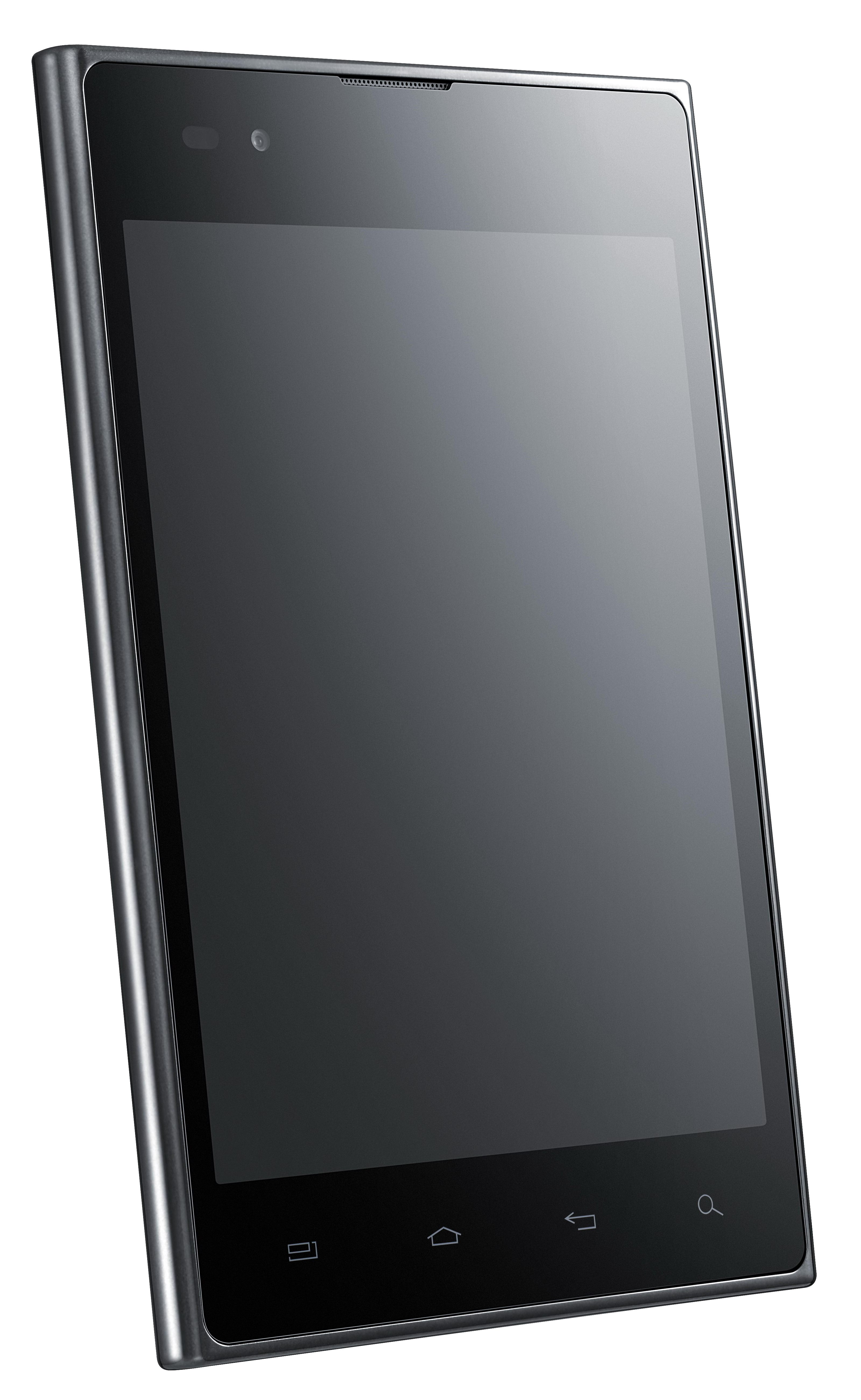 LG Optimus Vu